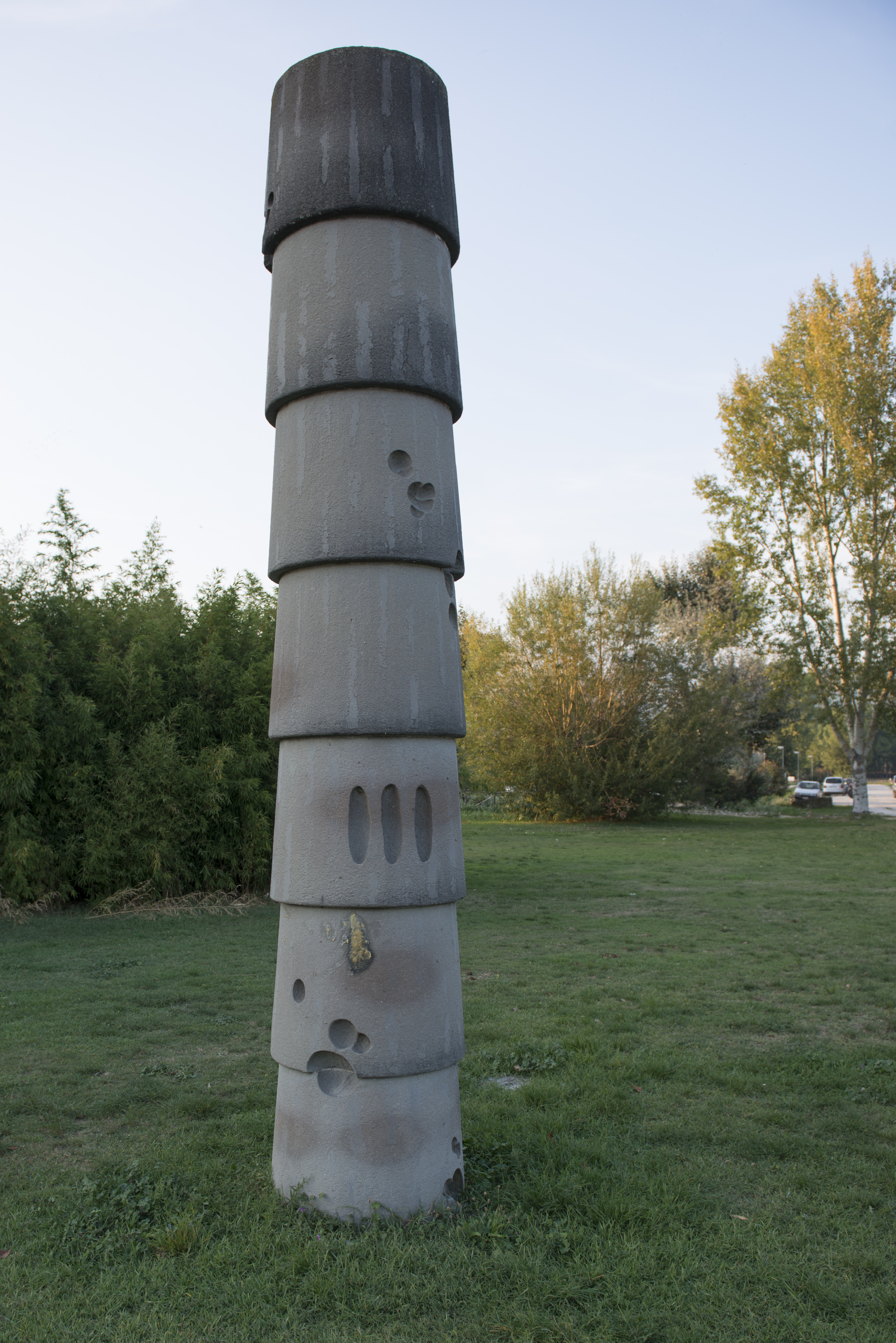 Campo del Sole This is a photo of a monument which is part of cultural heritage of Italy.